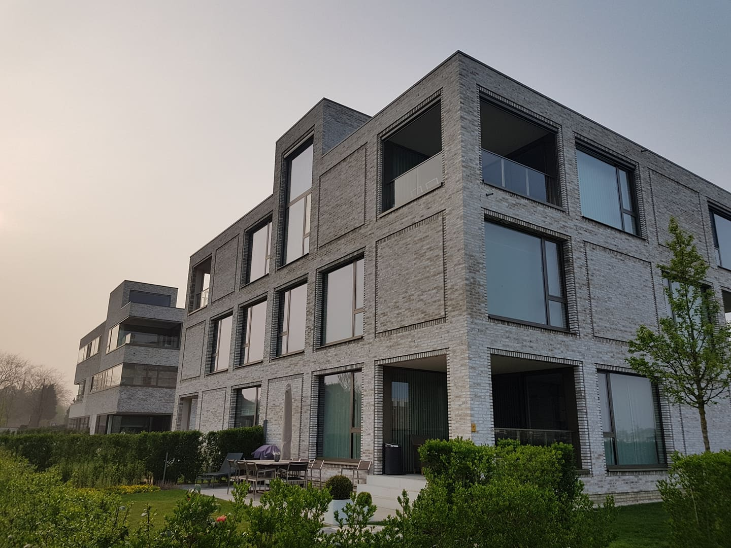 De twee appartementsgebouwen op de koolmijnsite van Beringen.